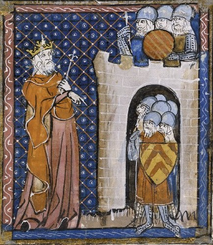 Saladin et son armée